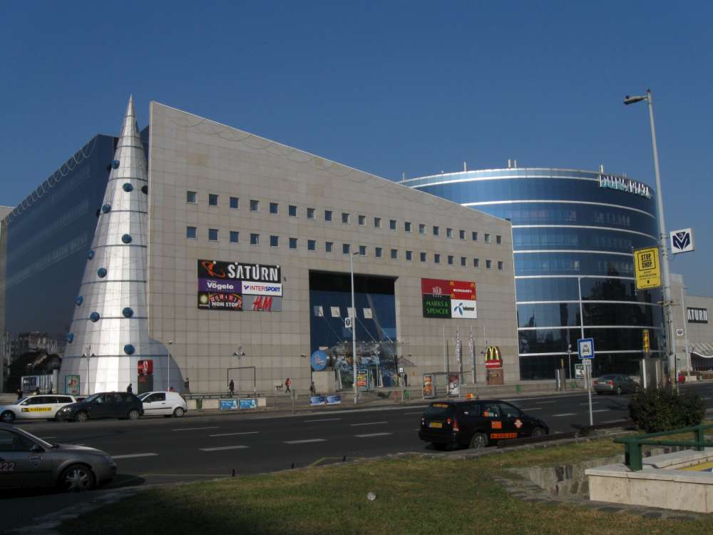 Budapest, Duna-pláza (XIII. ker., Váci út 178.)